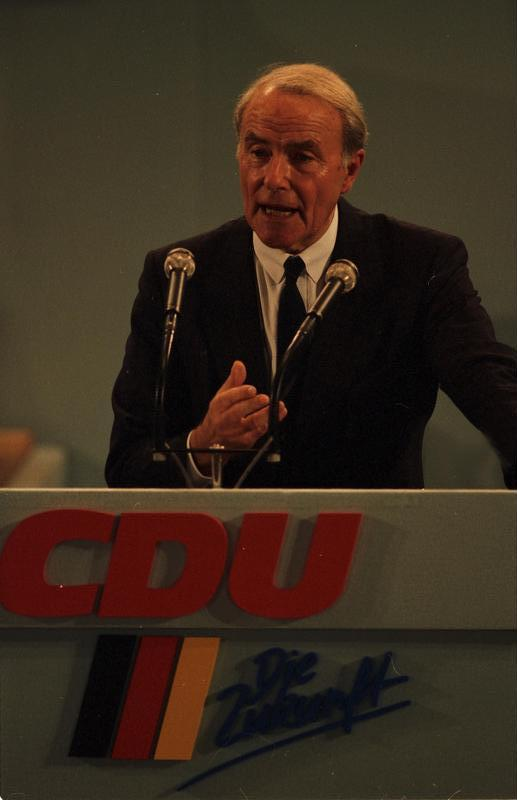 9.11.1987 35. Bundesparteitag der CDU in der Beethovenhalle, Bonn